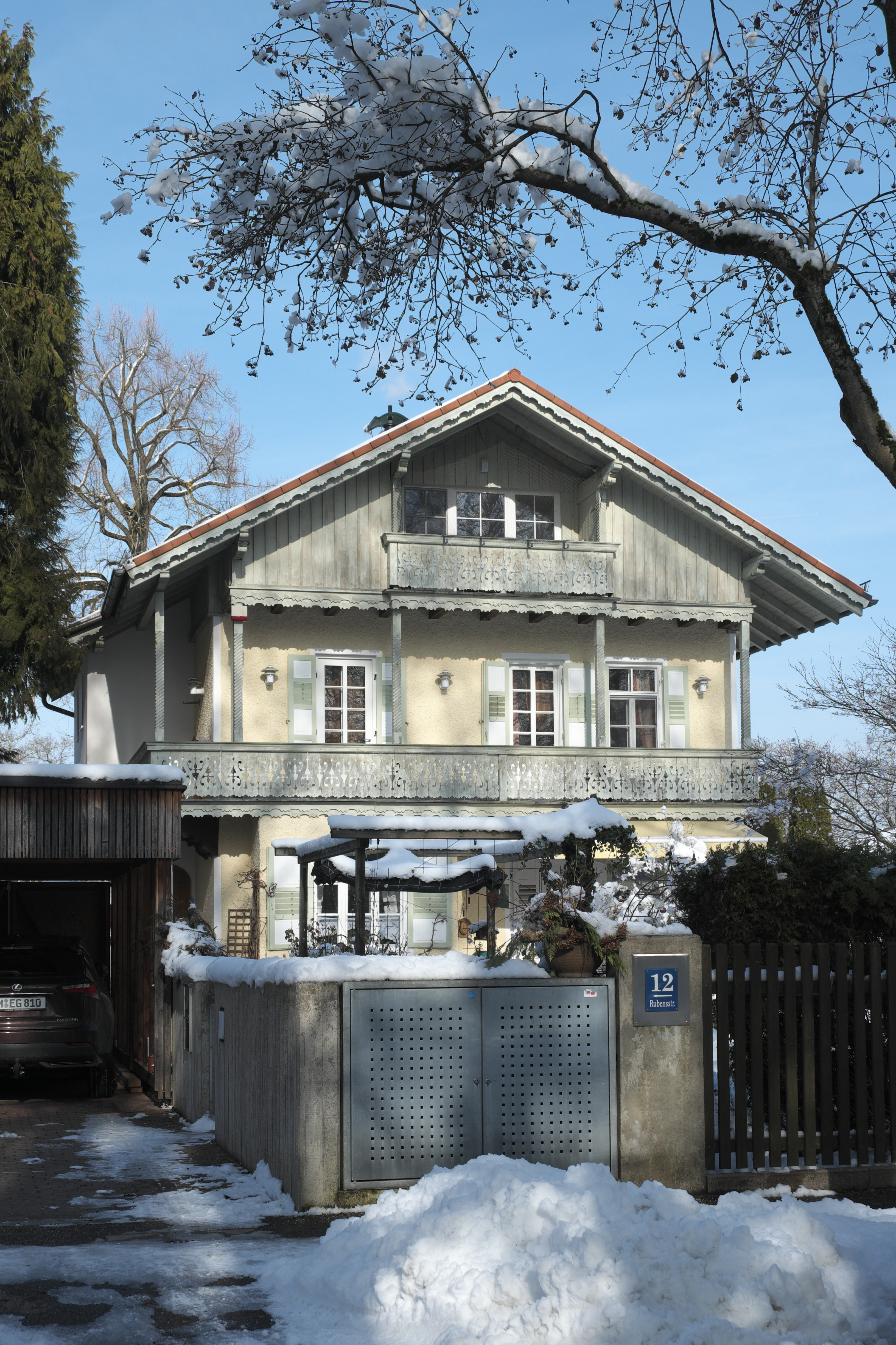 Villa, Rubensstraße 12, in Obermenzing im Stadtbezirk Pasing-Obermenzing in München (Bayern/Deutschland), um 1900 erbaut, aus dem Büro August Exter